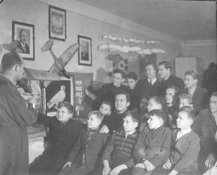 Kierownik modelarni Otton Kłos wtajemnicza w arkana sztuki modelarskiej, w nowej modelarni "Ośrodka Ligi Lotniczej", otwartej w rocznicę powstania PKWN, w Gliwicach przy ul. Dworcowej (22 lipca 1949)